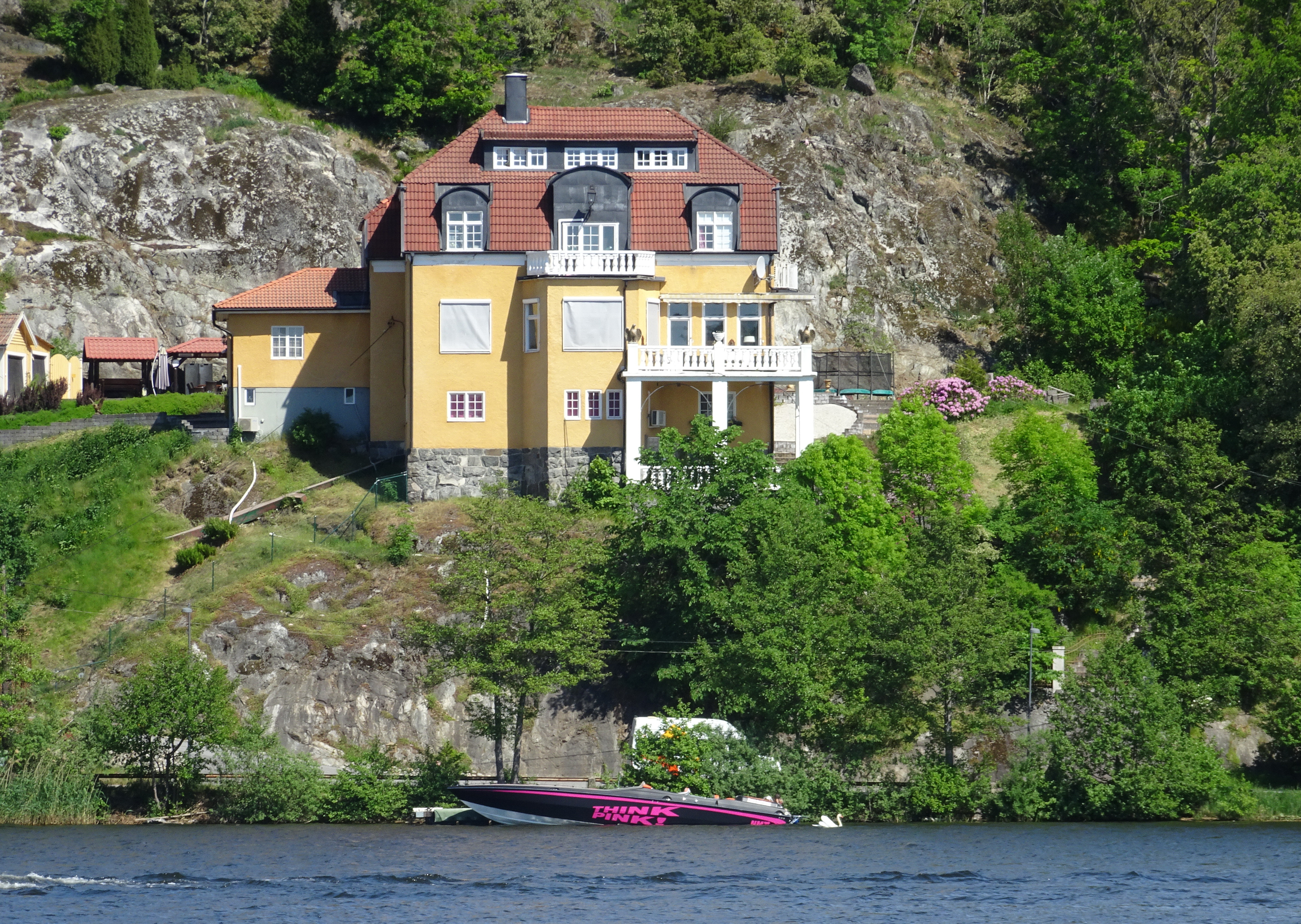 Villa Stora Örnberga, Tullinge strand 32. Huset byggdes 1910-1911.